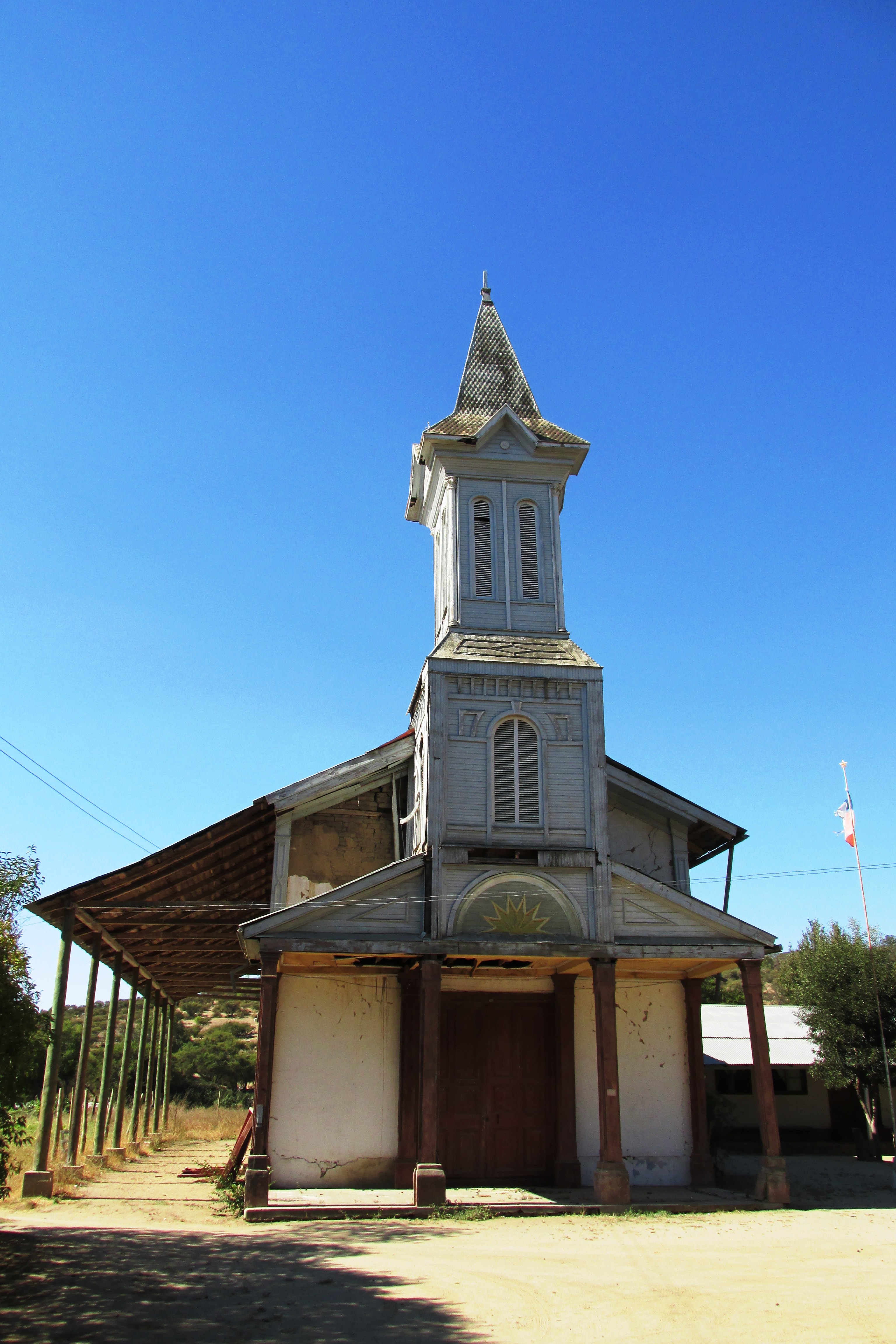 Frontis Iglesia de Loica comuna de San Pedro Región Metropolitana